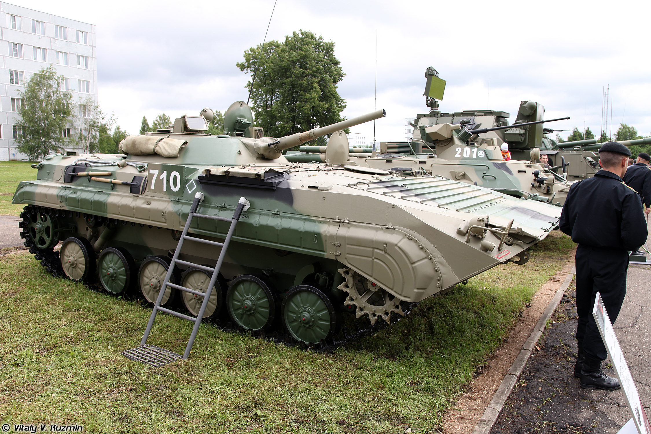 Боевая разведывательная машина БРМ-1К (Armored reconnaissance vehicle BRM-1K)